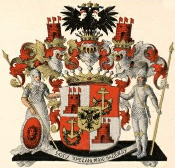 Wenge gen. Lambsdorffi suguvõsa krahvivapp